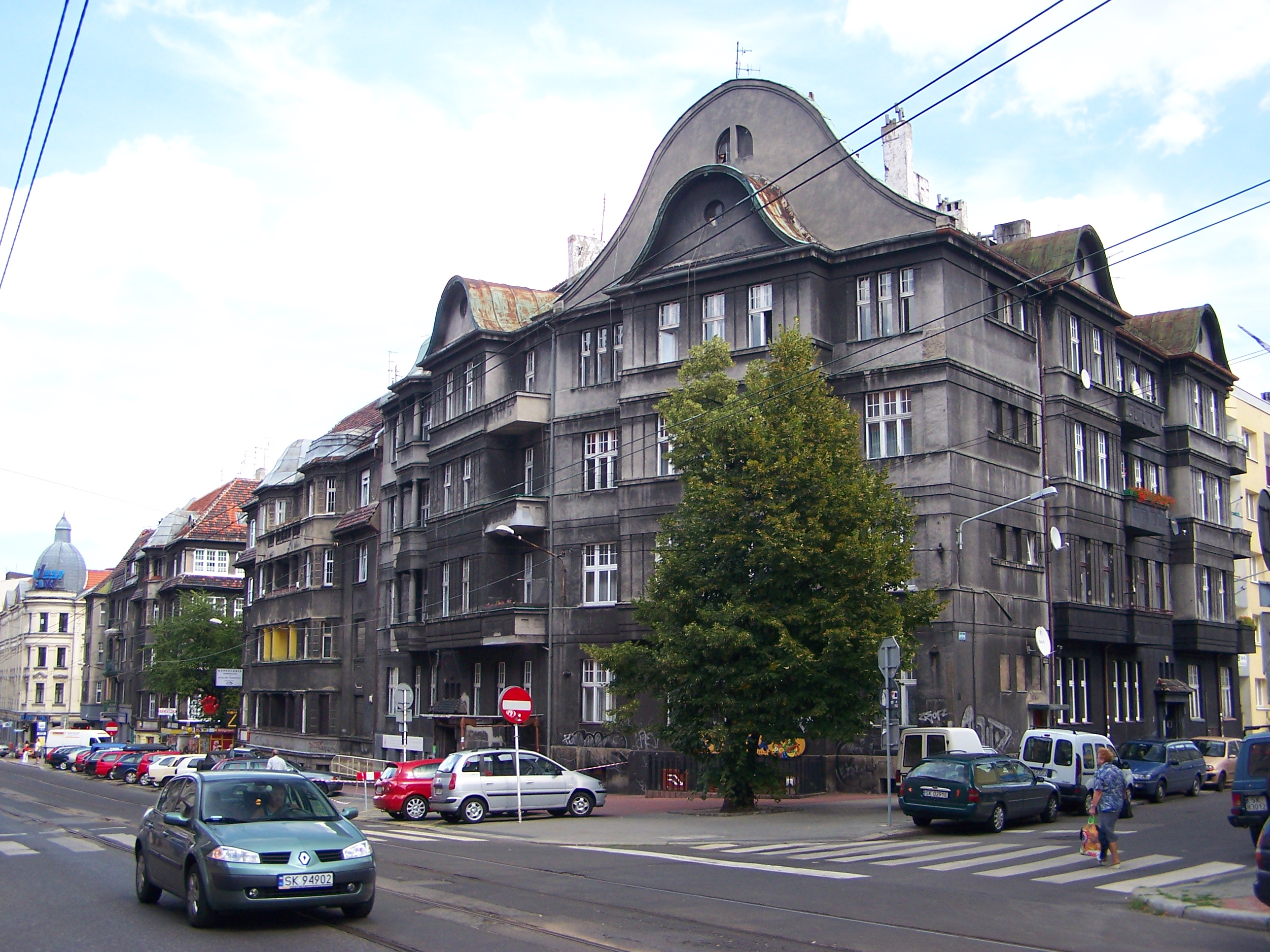 Ulica Kościuszki w Katowicach. Kamienica przy ul. Jordana 14